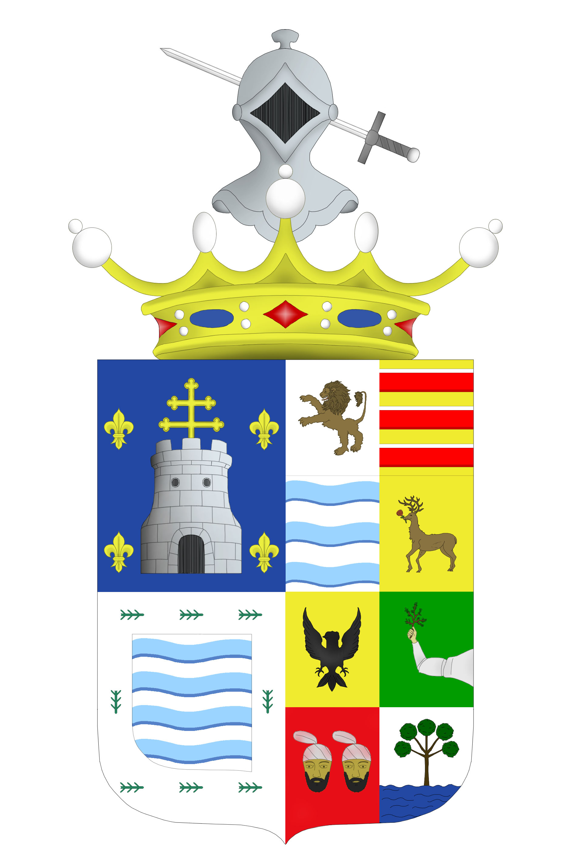 Brasão de Armas correspondente ao título nobiliárquico Visconde De Ximenez. Versão digitial